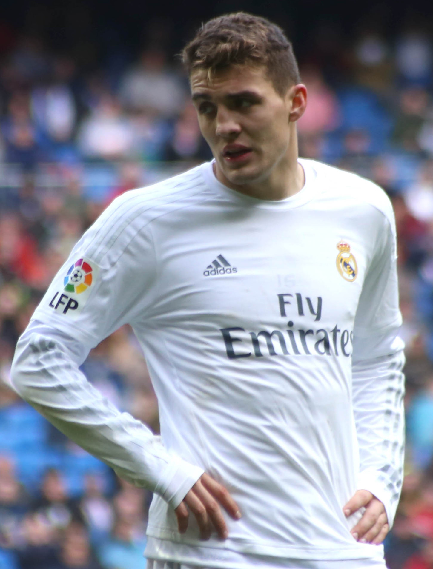 Mateo Kovačić